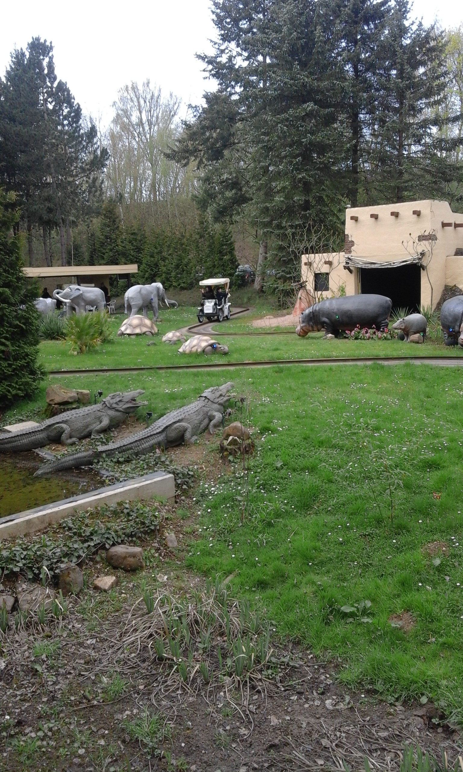 Afrika-Fotosafari Gesamte Anlage